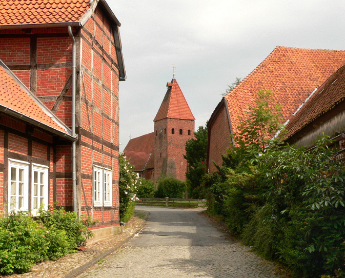 Blick auf Kirche in Drakenburg, bim Bau auf der höchsten Stelle im Dorf gelegen